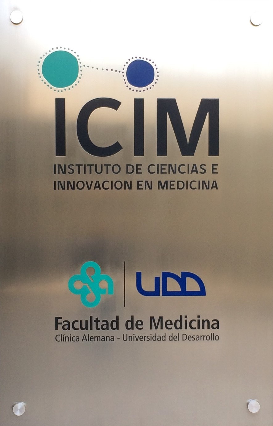 Foto de la placa que se encuentra en el ingreso del Instituto de Ciencias e Innovación en Medicina - Plaza de Investigación - UDD